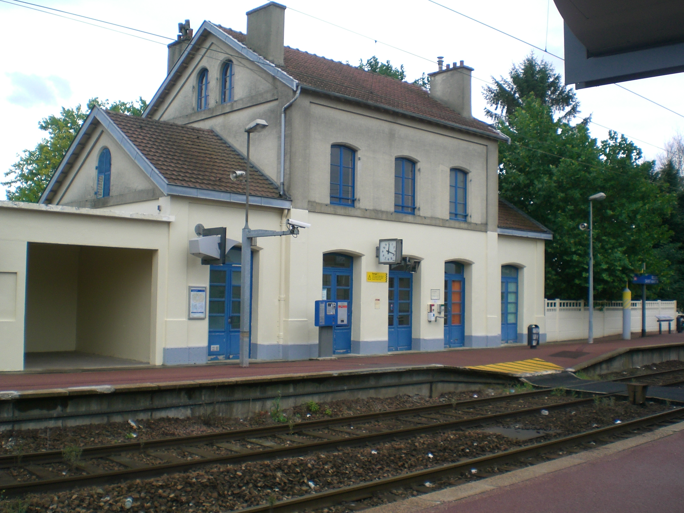 gare de belloy en france vu derriere